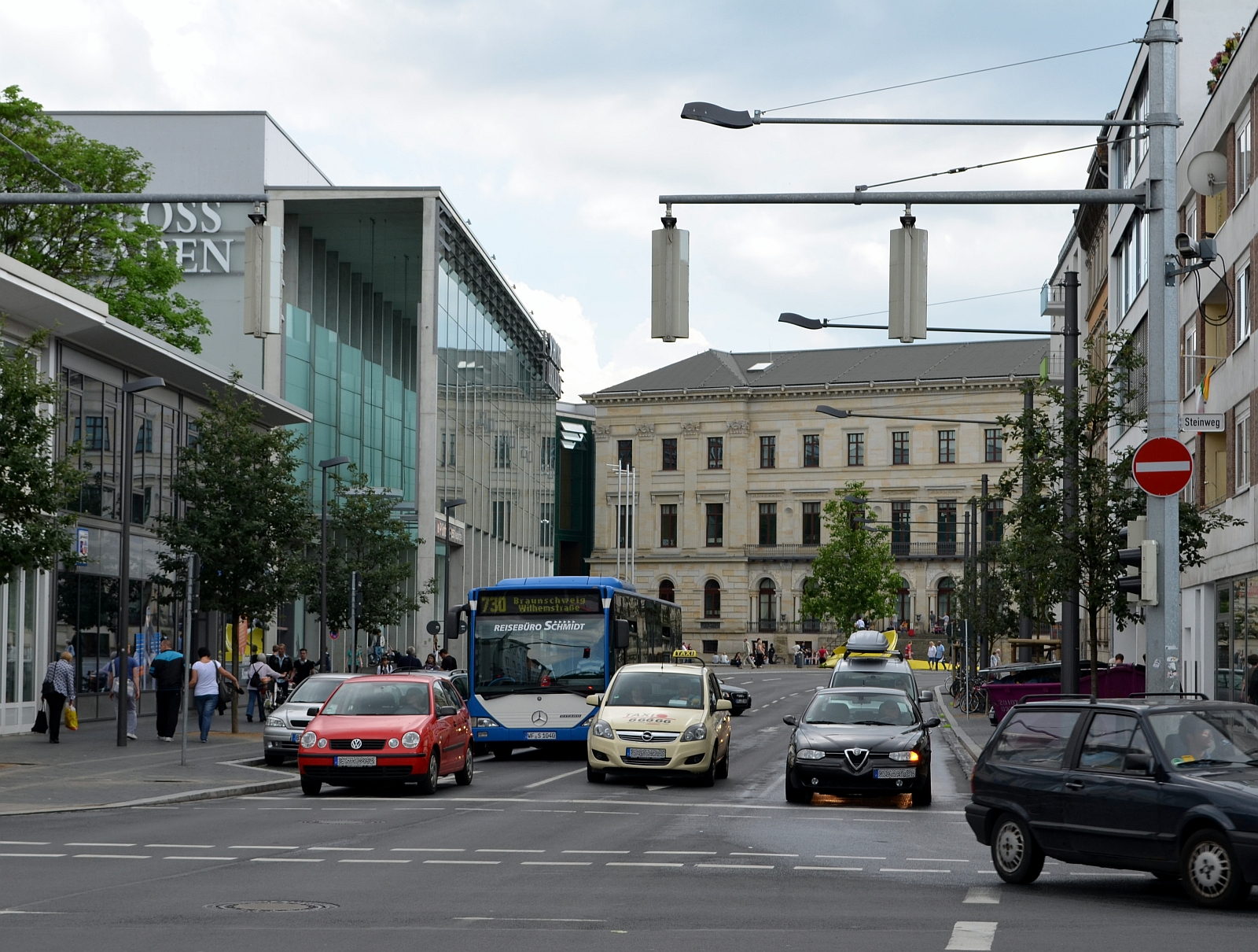 Braunschweig, Ritterbrunnen: Blickrichtung Süden von der Kreuzung Steinweg Richtung Schloss-Arkaden bzw. Braunschweiger Schloss.